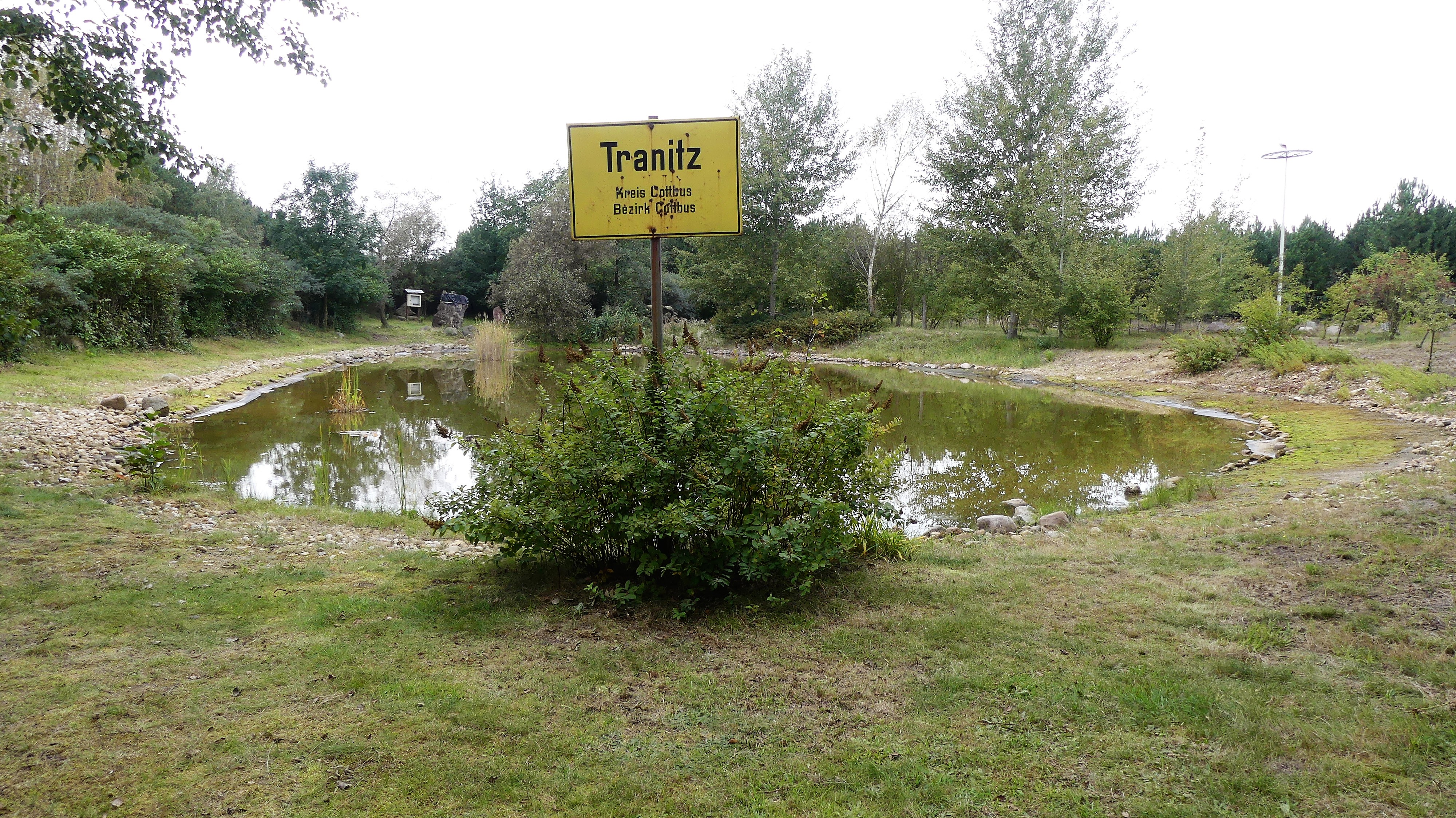 Erinnerungsstätte für des abgebaggerte Dorf Tranitz im Bereich des Tagebaus Cottbus-Nord.